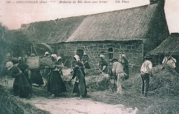 Brignogan : batterie de blé dans une ferme (carte postale, ND photo, début XXe siècle, avant 1918)